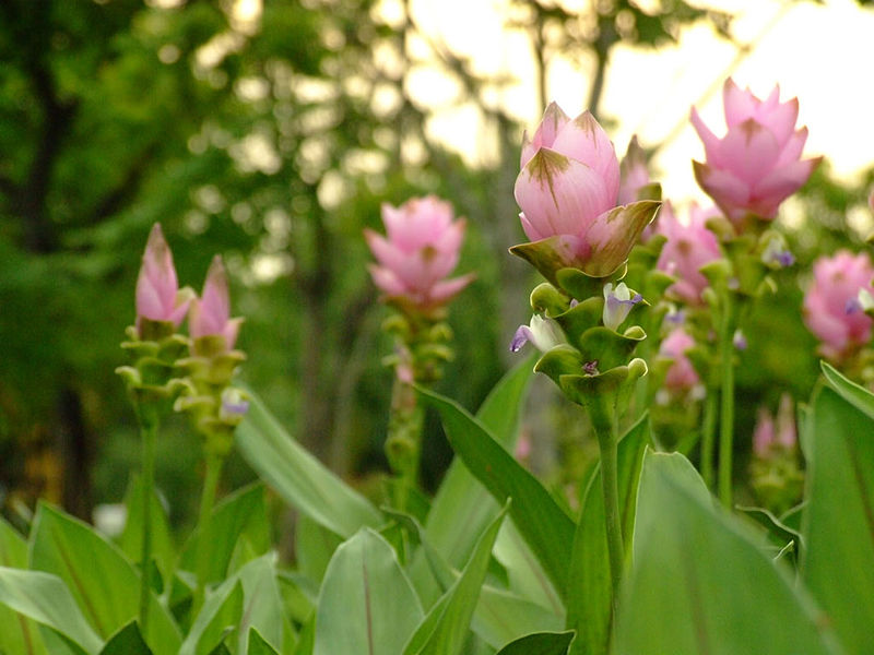 Curcuma alismatifolia Pathumma_PalePink_Suanluang in King Rama IX Royal Park, Bangkok